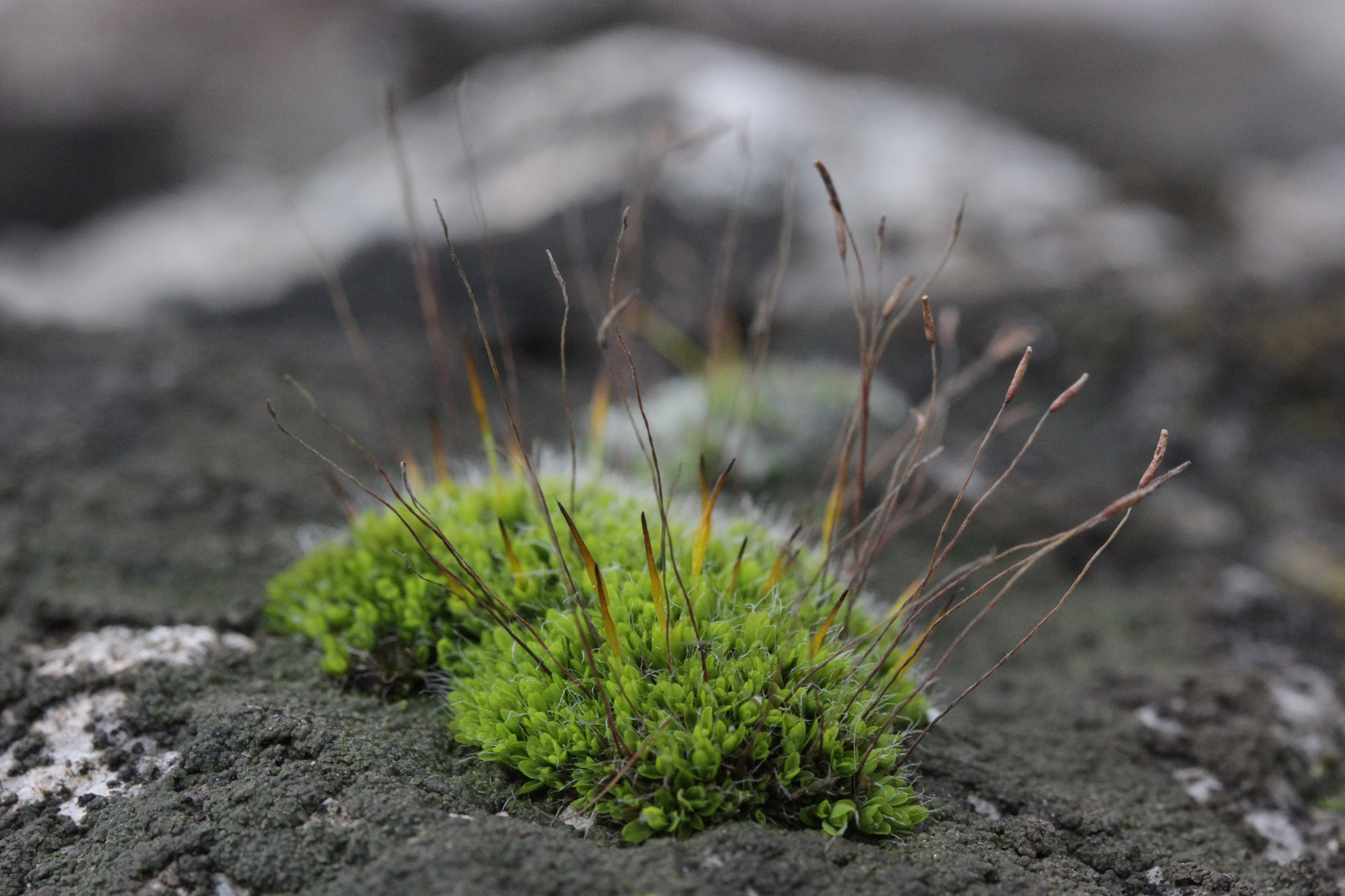 Tortula muralis